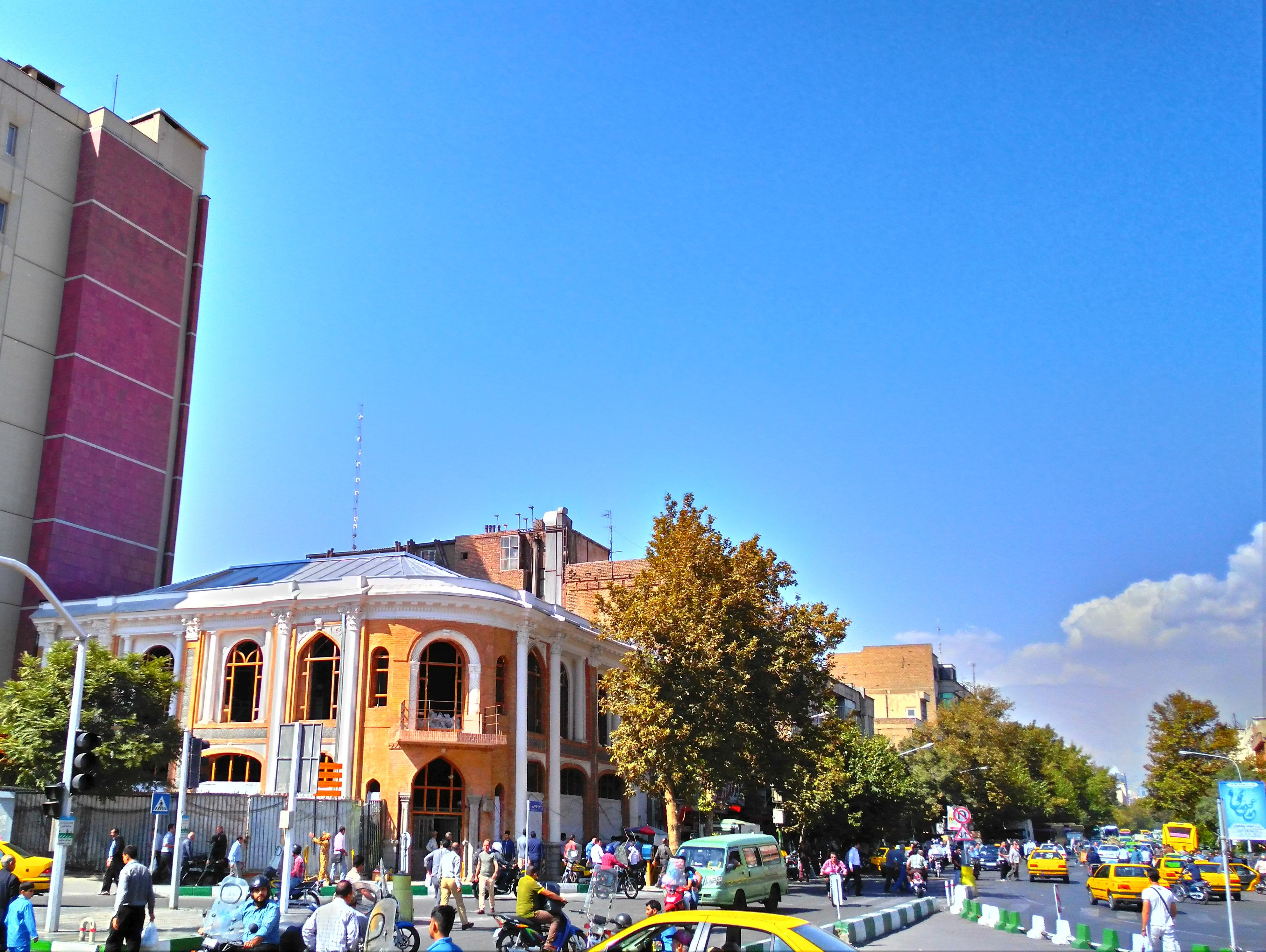 موزه صنعتی ۱۳ آبان